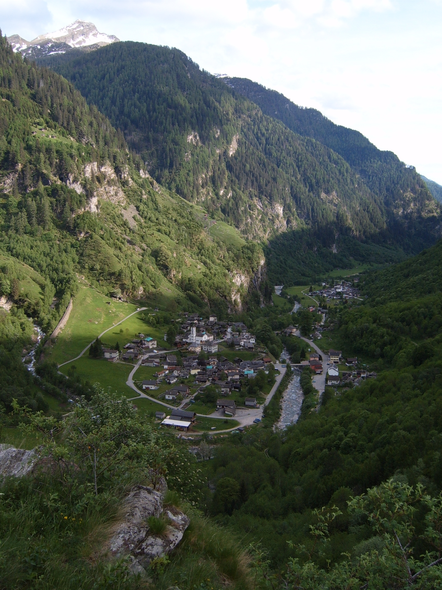 Rossa, Val Calanca, Grisons (Switzerland)